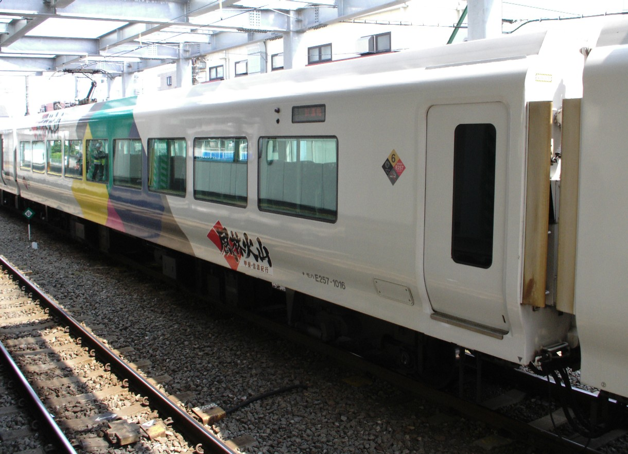 JR東日本モハE257-1016 (河辺駅にて)